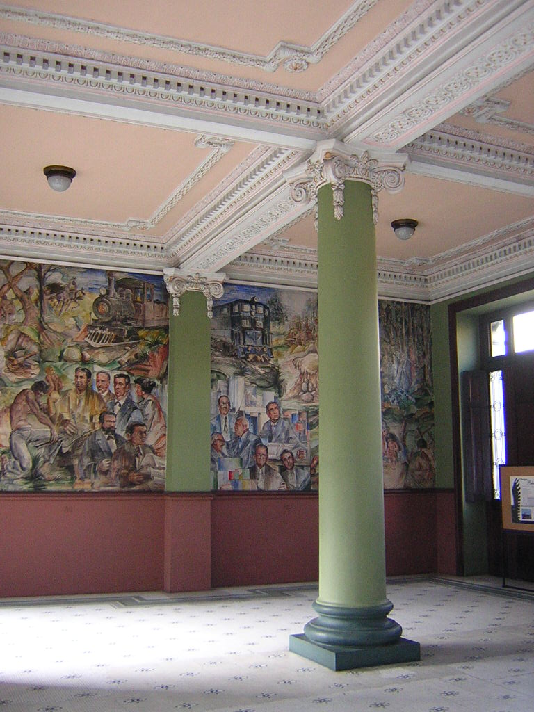 Estación del Ferrocarril de Antioquia, Medellín, Colombia